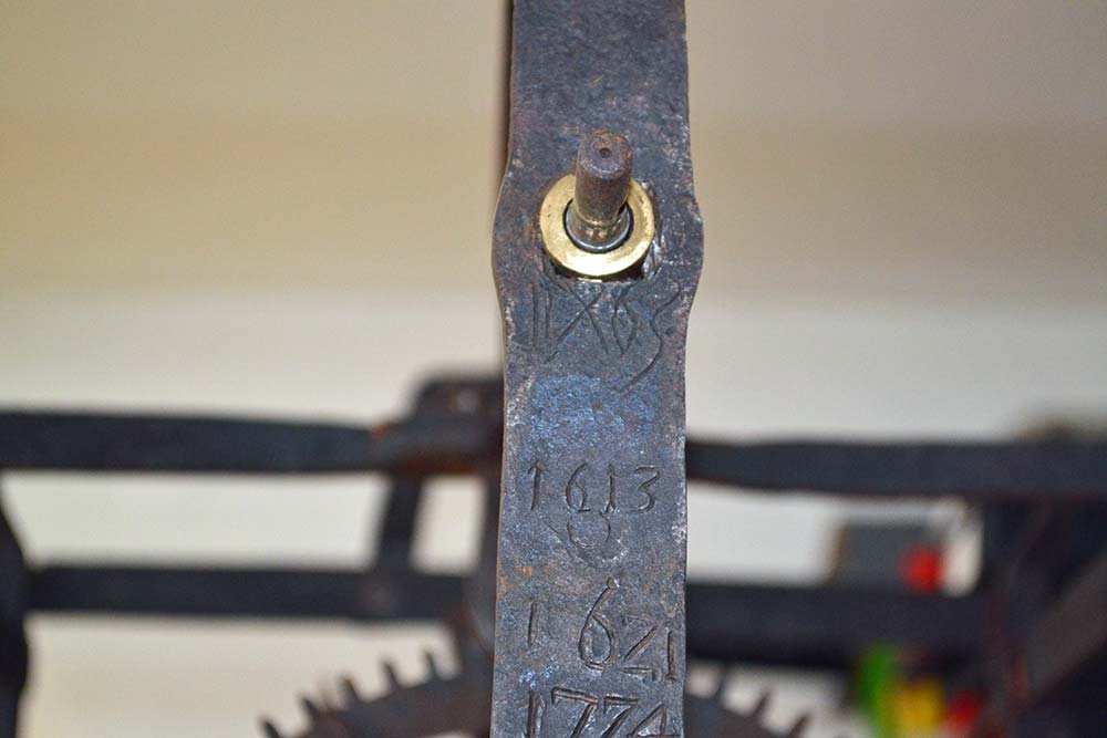 Nahaufnahme des Uhrengestells mit eingravierten Jahreszahlen